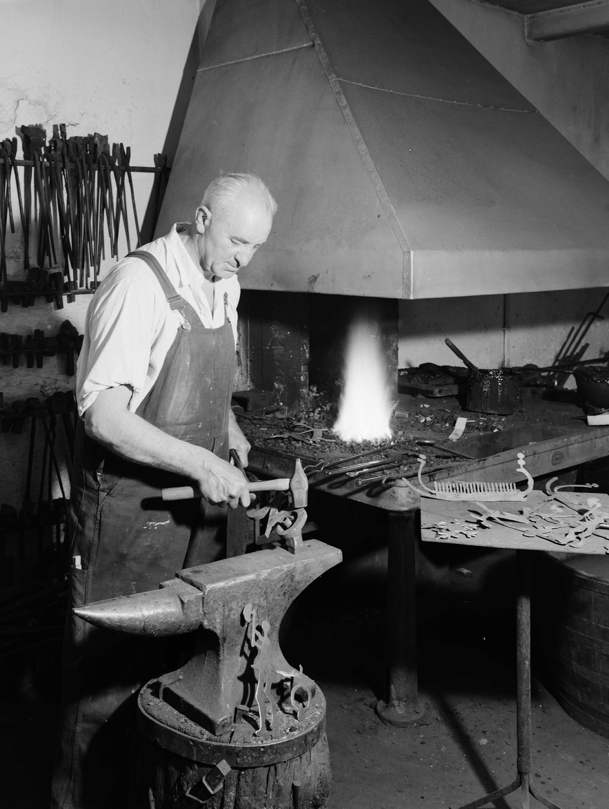 Karl Bruno Bilgrei (eller Carl Bruno Bilgrei). Foto: Leif Ørnelund. Fra Byhistorisk samling hos Oslo Museum.